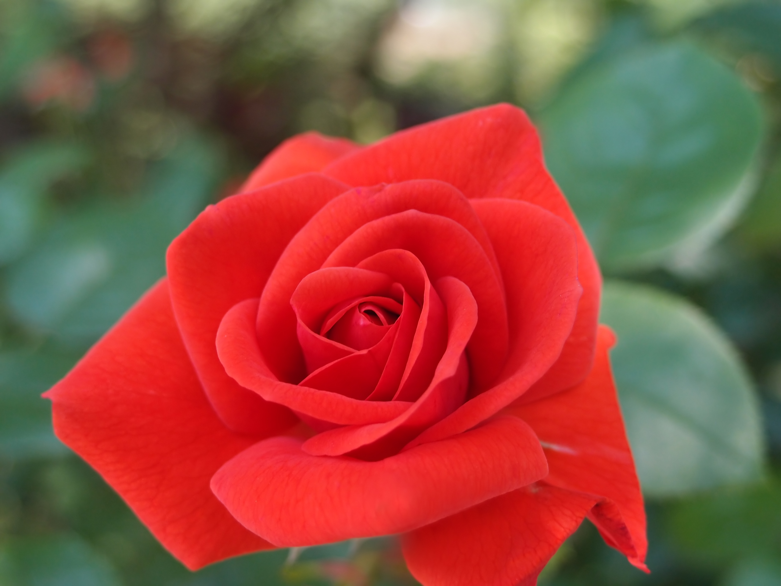 Rose,Feuerfunken,バラ,フォイアーフンケン, Shrub rose シュラブ Germany ドイツ GPG Bad Langensalza 1979